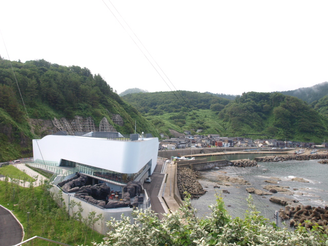 新しく建替えられた鶴岡市立加茂水族館